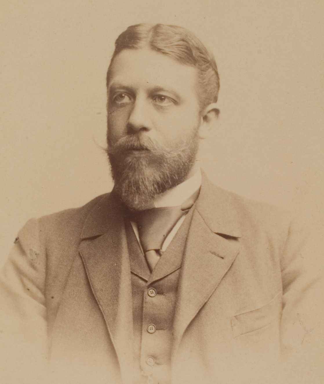 Friedrich Adolf Karl Wilhelm Alexander Maurer, Anatom, 1893–1901 Professor in Heidelberg